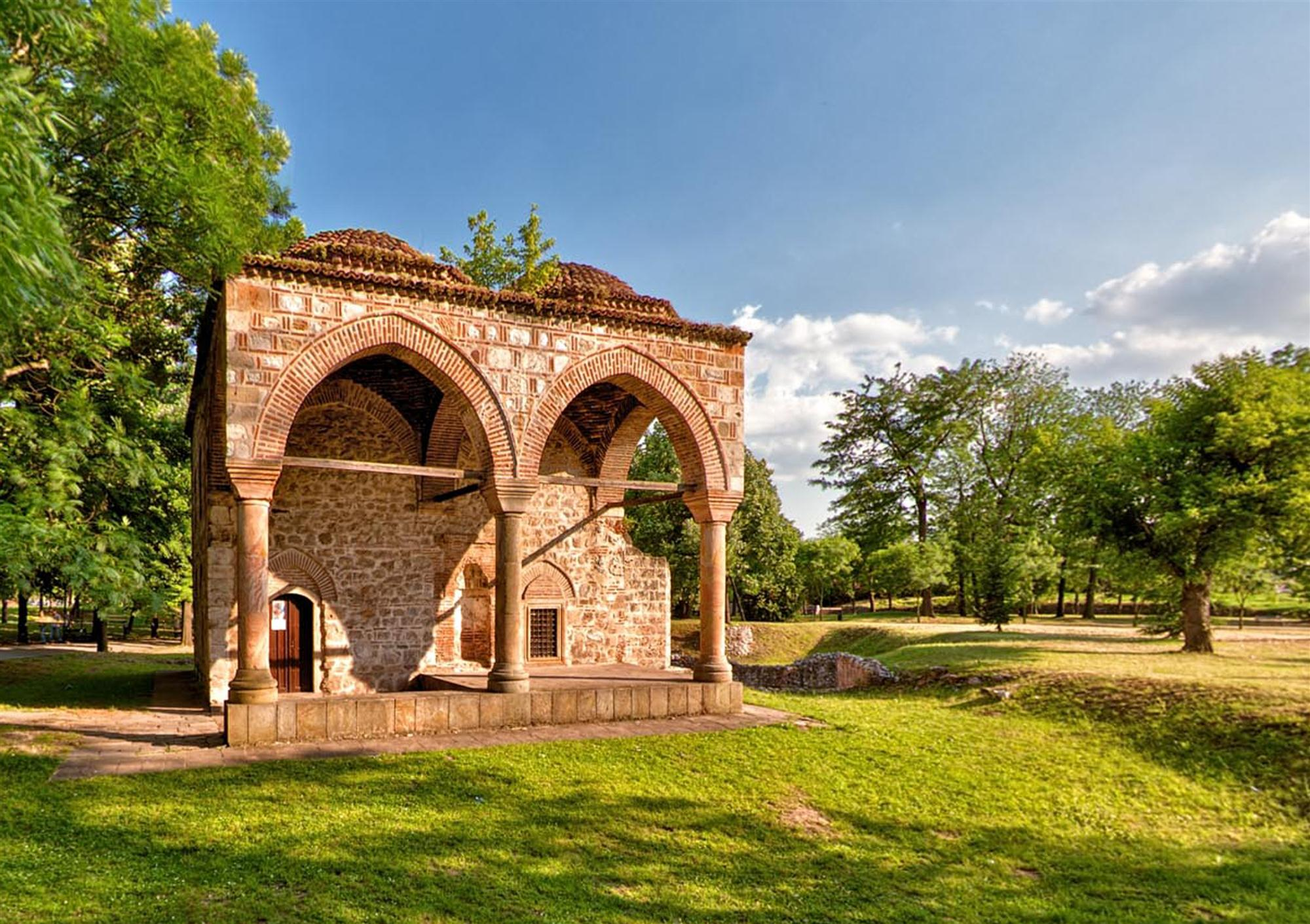 Bali Begova Dzamija u Nišu